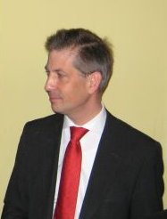 Klaus Schüle auf dem Neujahrsempfang der Freiburger CDU